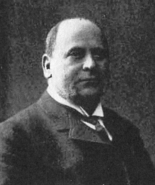 Affärsmannen Fredrik Althainz